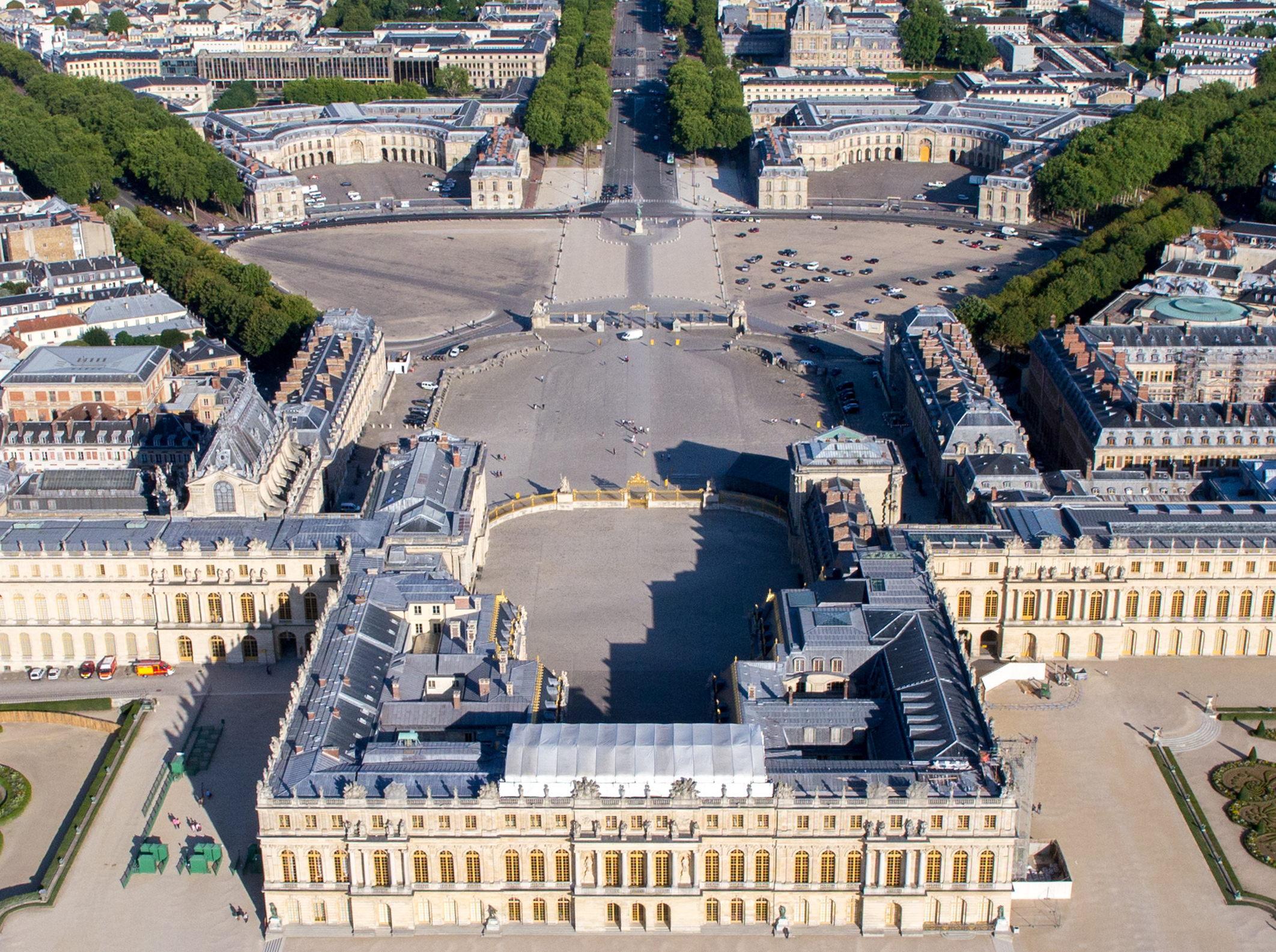 Détail de la photo File:Vue aérienne du domaine de Versailles par ToucanWings - Creative Commons By Sa 3.0 - 073.jpg